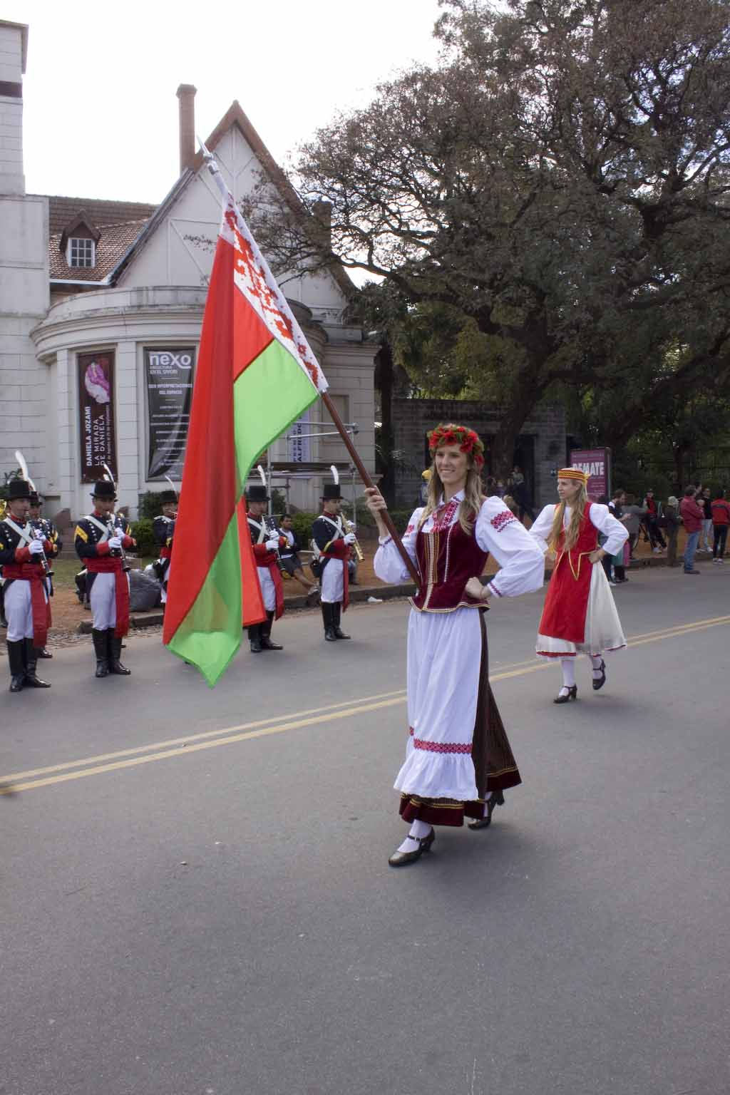 Dia del inmigrante 013